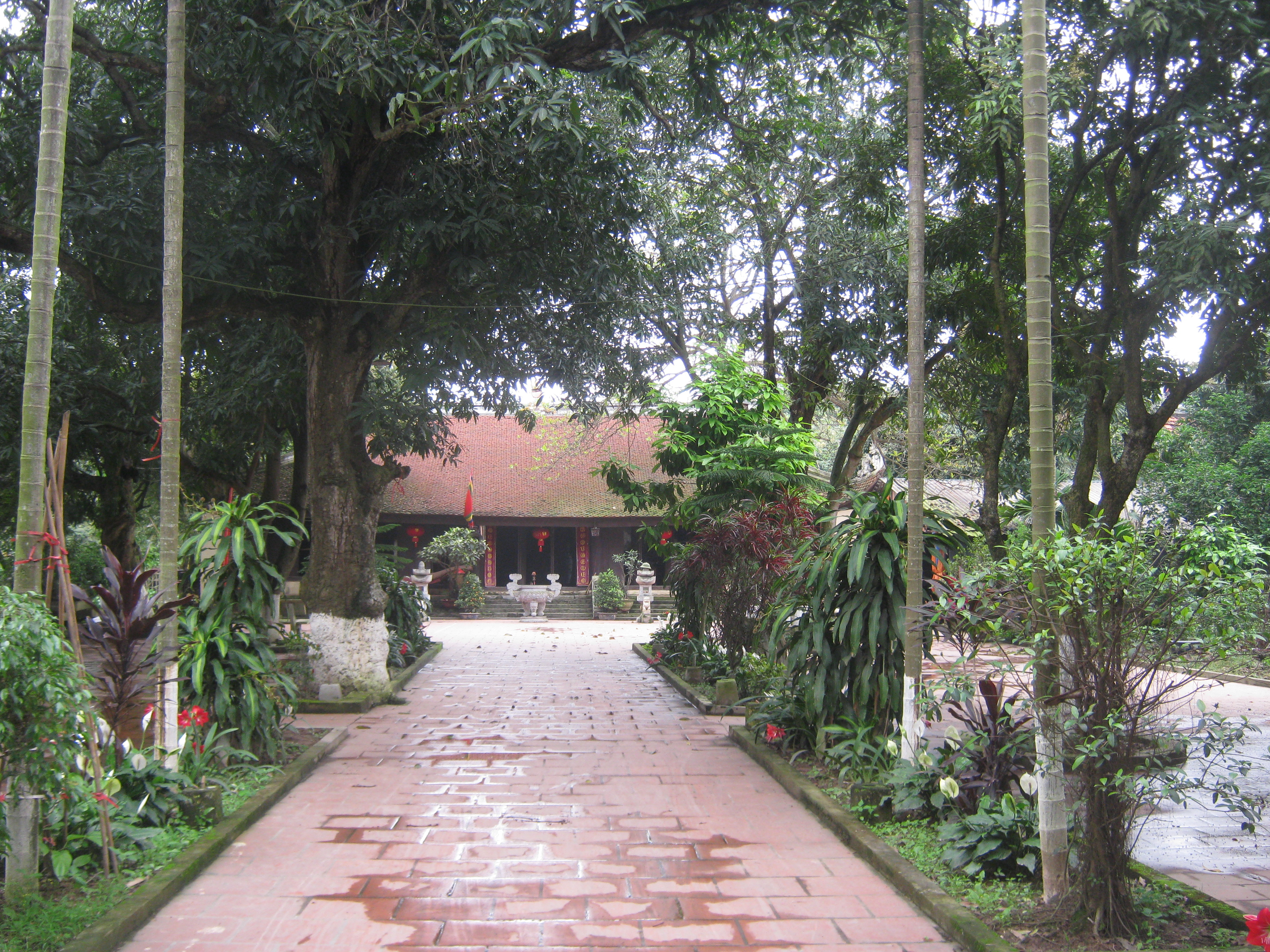 Đình Đông Phù ở Đông Mỹ, Thanh Trì, Hà Nội - Nơi thờ sứ quân Nguyễn Siêu - vị tướng thời vi:12 sứ quân